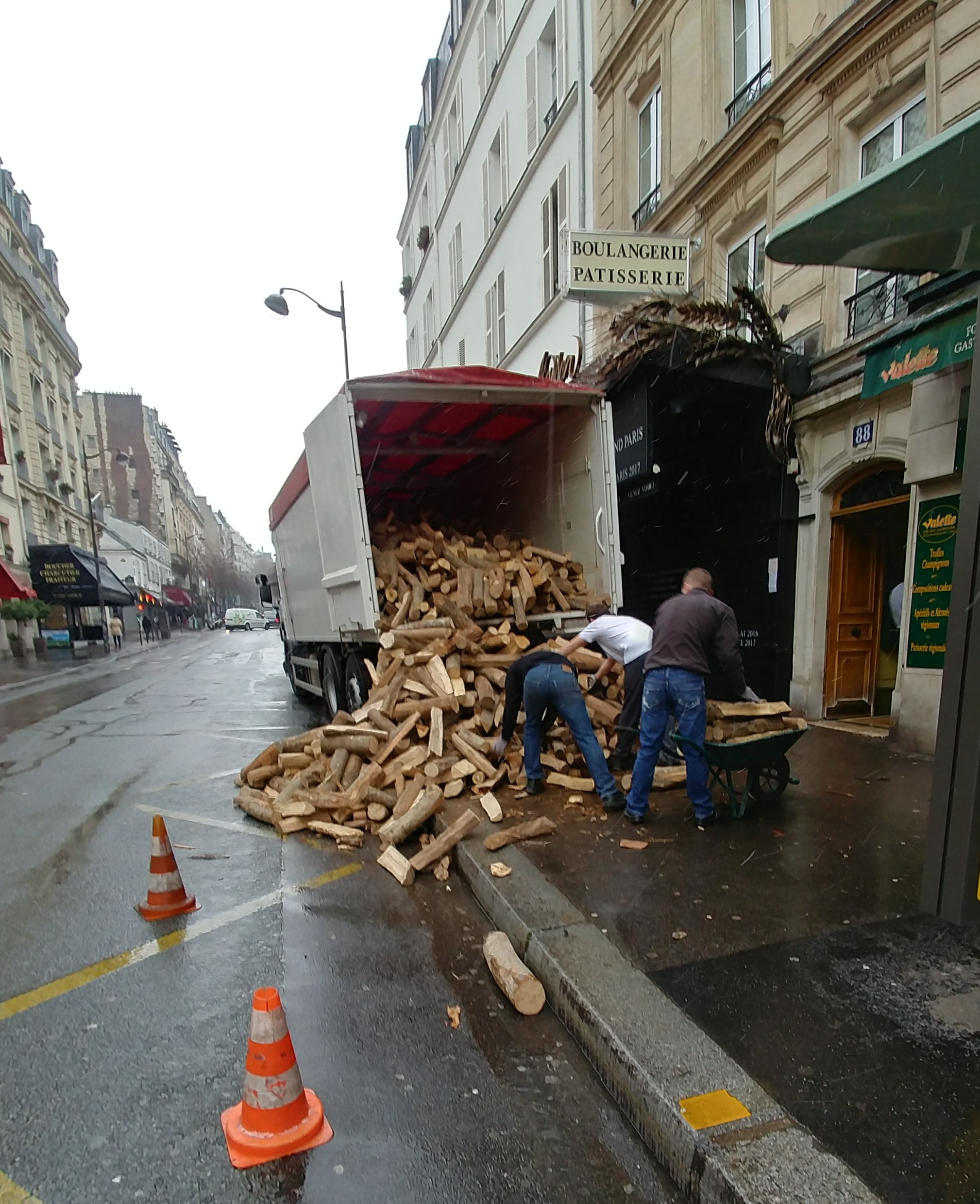 Une livraison de bûches de bois dans le 15ème arrondissement de Paris. Probablement pour la boulangerie qui cuit, peut-être, une partie de ses pains au feu de bois...